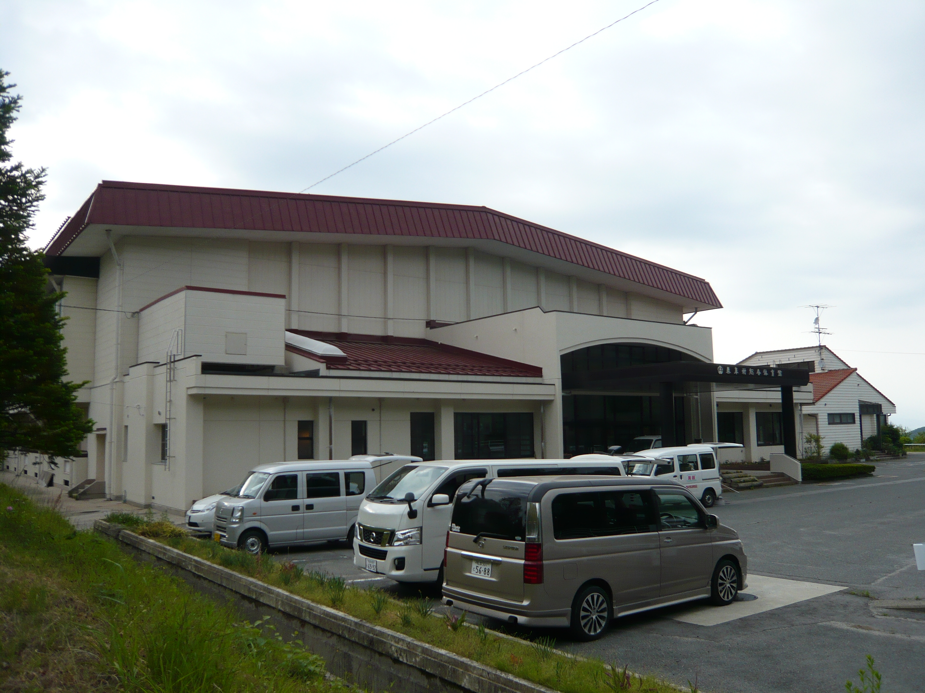 泰阜村総合体育館